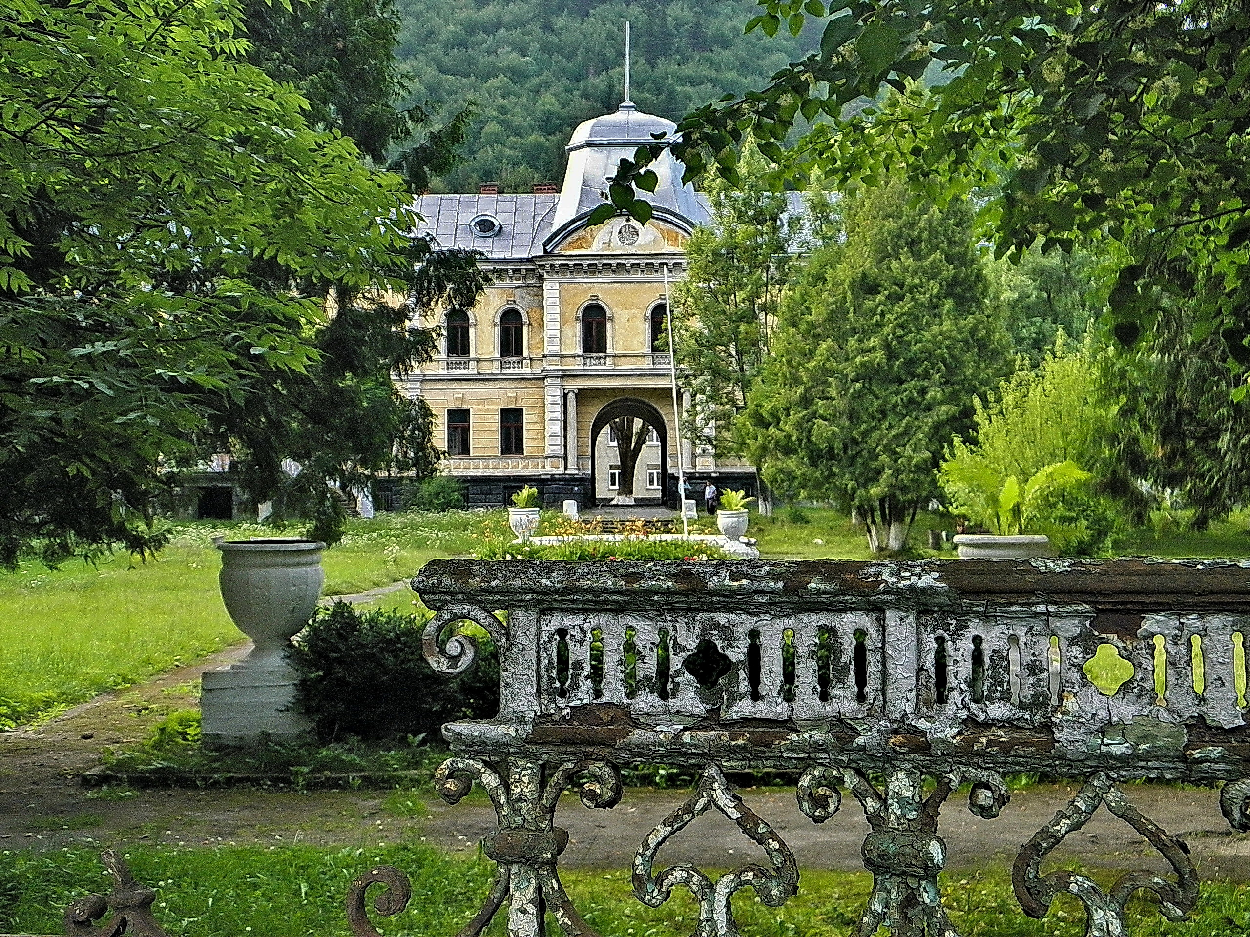 Парк, Сколе, вул. Святослава, 40